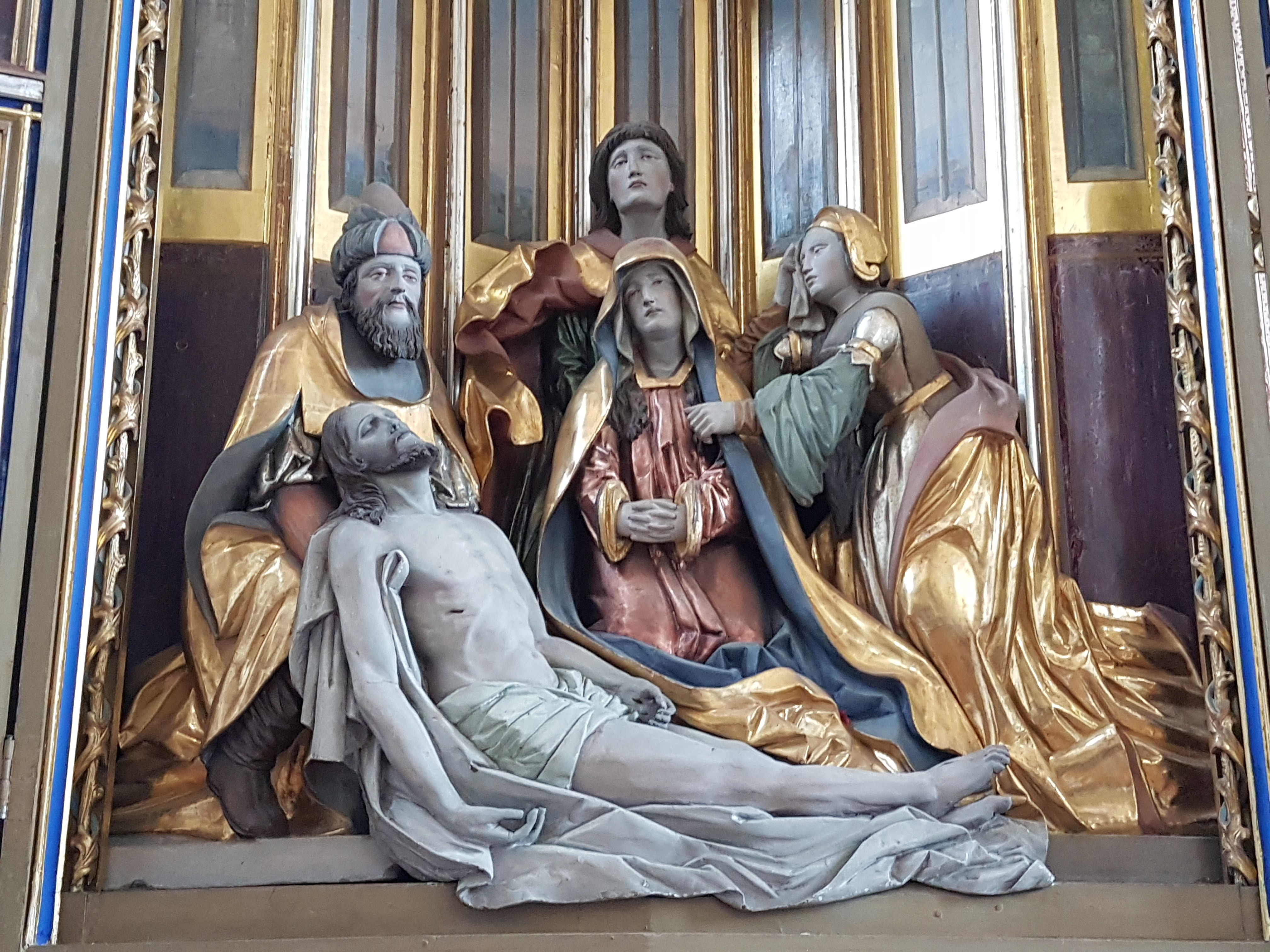 St. Johann der Täufer (Petting)